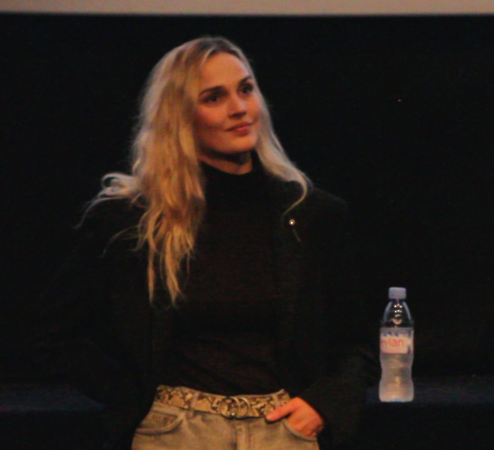 Camille Lou à l'avant-première du film "Jusqu'ici tout va bien" à Lille le 11 février 2019